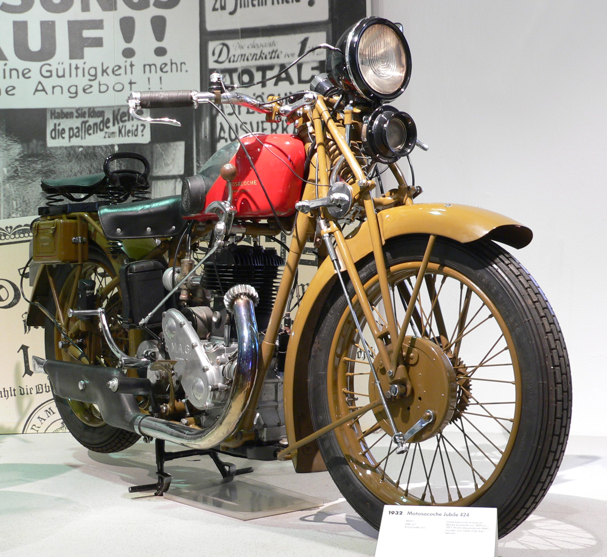 Motorbike "Motosacoche Jubile 424" (1932) at the Deutsches Zweirad- und NSU-Museum